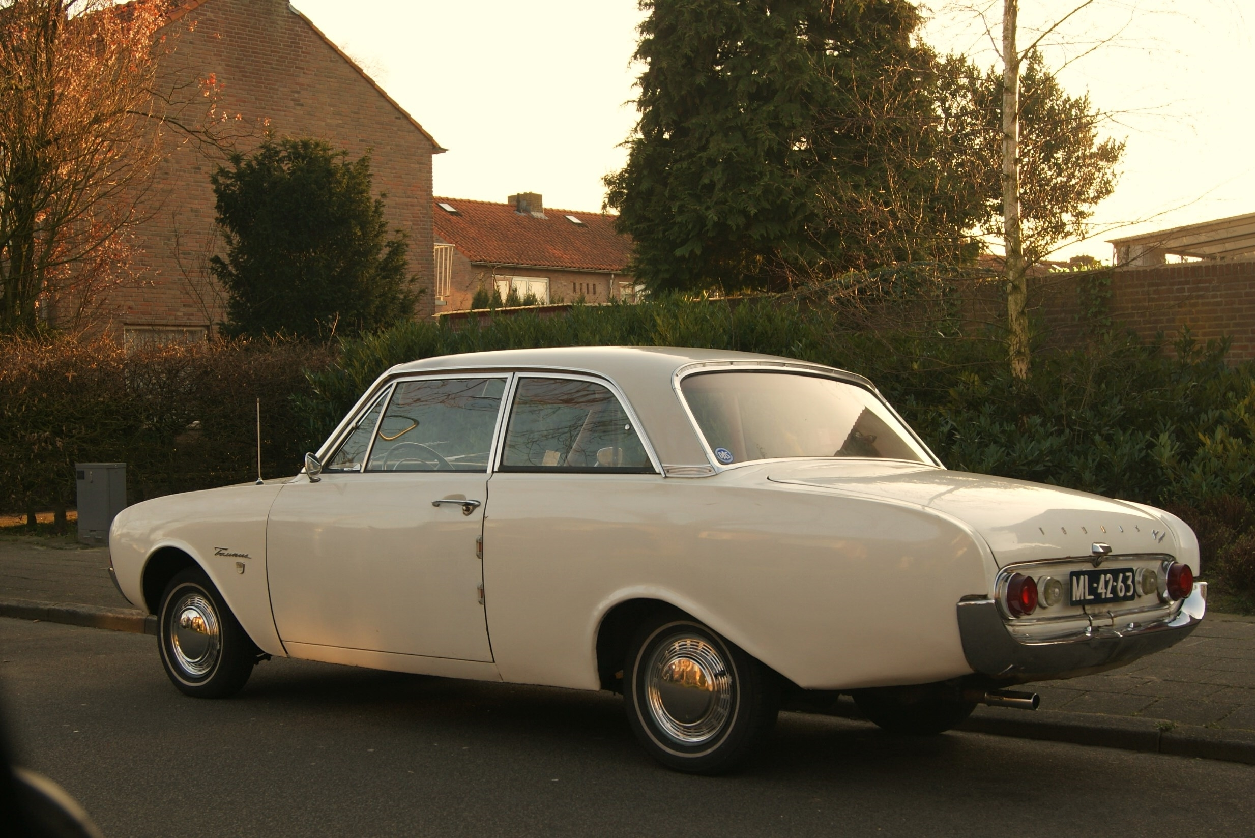 ML-42-63